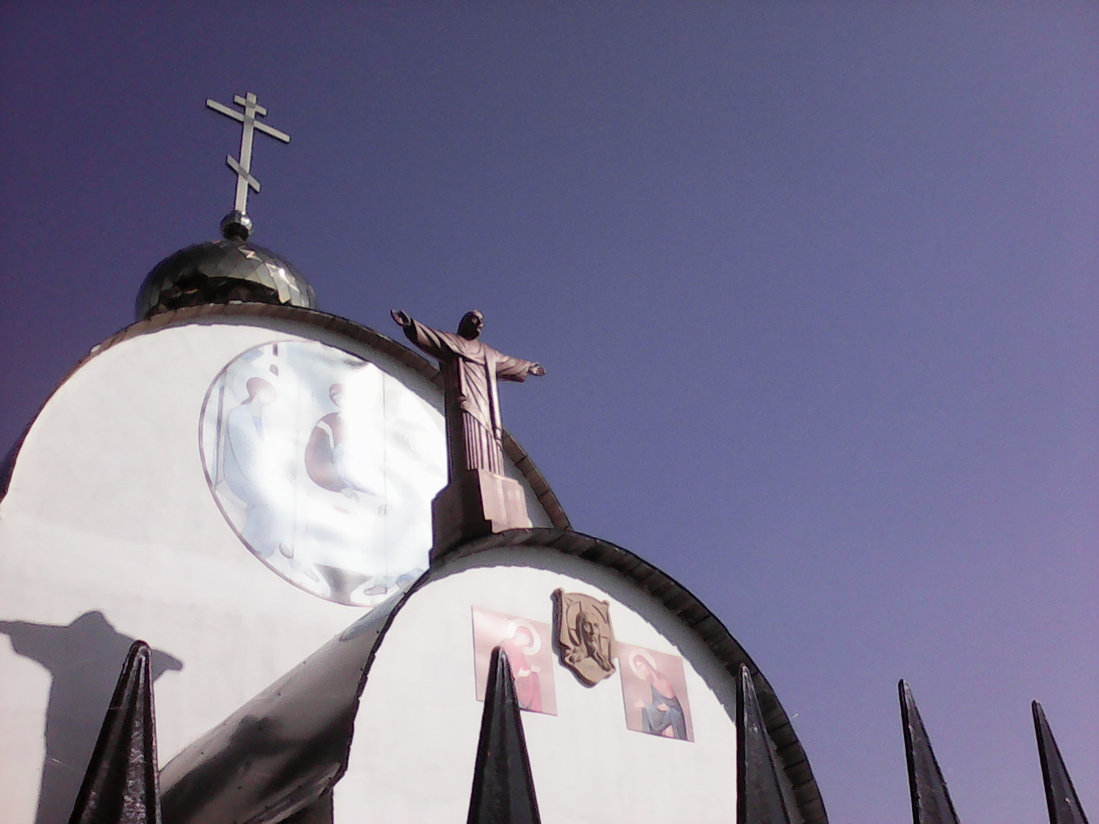 Статуя Христа-Искупителя (уменьшенная копия) над входом в храм Александра Невского в посёлке Комсомольский города Светлого